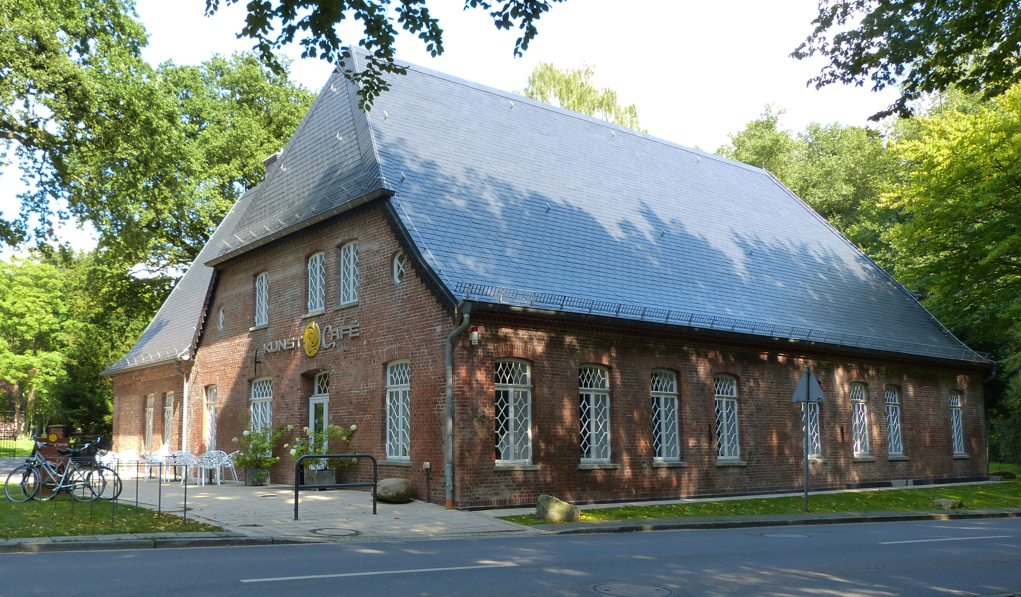 Haus Tillery in Bremen, Auf dem Hohen Ufer 35, Südwestecke 2013-09Das abgebildete Objekt ist ein geschütztes Kulturdenkmal in der Freien Hansestadt Bremen, mit der Nr. 1884 beim Landesamt für Denkmalpflege registriert.